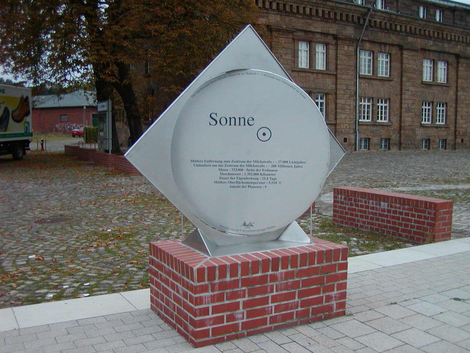 Planetenweg Minden: Im Bild dargestellter Himmelskörper: Sonne Aufstellungsort: Auf dem Simeonsplatz, vor dem Preußenmuseum Stationsnummer: 1 Wanderwegkilometer: 0,00 km Erläuterung: Der Planetenweg in der Stadt Minden in Nordrhein-Westfalen ist ein Wanderweg und gleichzeitig Modell unseres Sonnensystems im Maßstab 1:1 Milliarde, also ein sogenannter Planetenweg. Dargestellt werden anhand maßstabsgerechter Skulpturen und maßstabsgerechter Aufstellung (Kreisdurchmesser entspricht Durchmesser des dargestellten Himmelskörper. Entfernung der Skulpturen entspricht der mittleren Entfernung der Himmelsobjekts) die Größenordnungen in unserem Sonnensystem. Achtung: Die eingeschlagenen Daten sind oftmals nicht wissenschaftlich exakt oder folgen einer anderen Definition. Inschrift: Der Durchmesser dieser Scheibe entspricht im Maßstab 1:1 Milliarde dem Durchmeser der Sonne Sonne (→ Astronomisches Symbol) Mittlere Entfernung zum Zentrum der Milchstraße: ~27.000 Lichtjahre Umlaufzeit um das Zentrum der Milchstraße: ~200 Millionen Jahre Jahre Masse: 333.000-fache der Erdmasse Durchmesser: 1.392.000 Kilometer Dauer der Eigendrehung: 25,4 Tage Mittlere Oberflächentemperatur: 5.510 °C Anzahl der Planeten: 9 Gestiftet von der Unternehmensgruppe Melitta